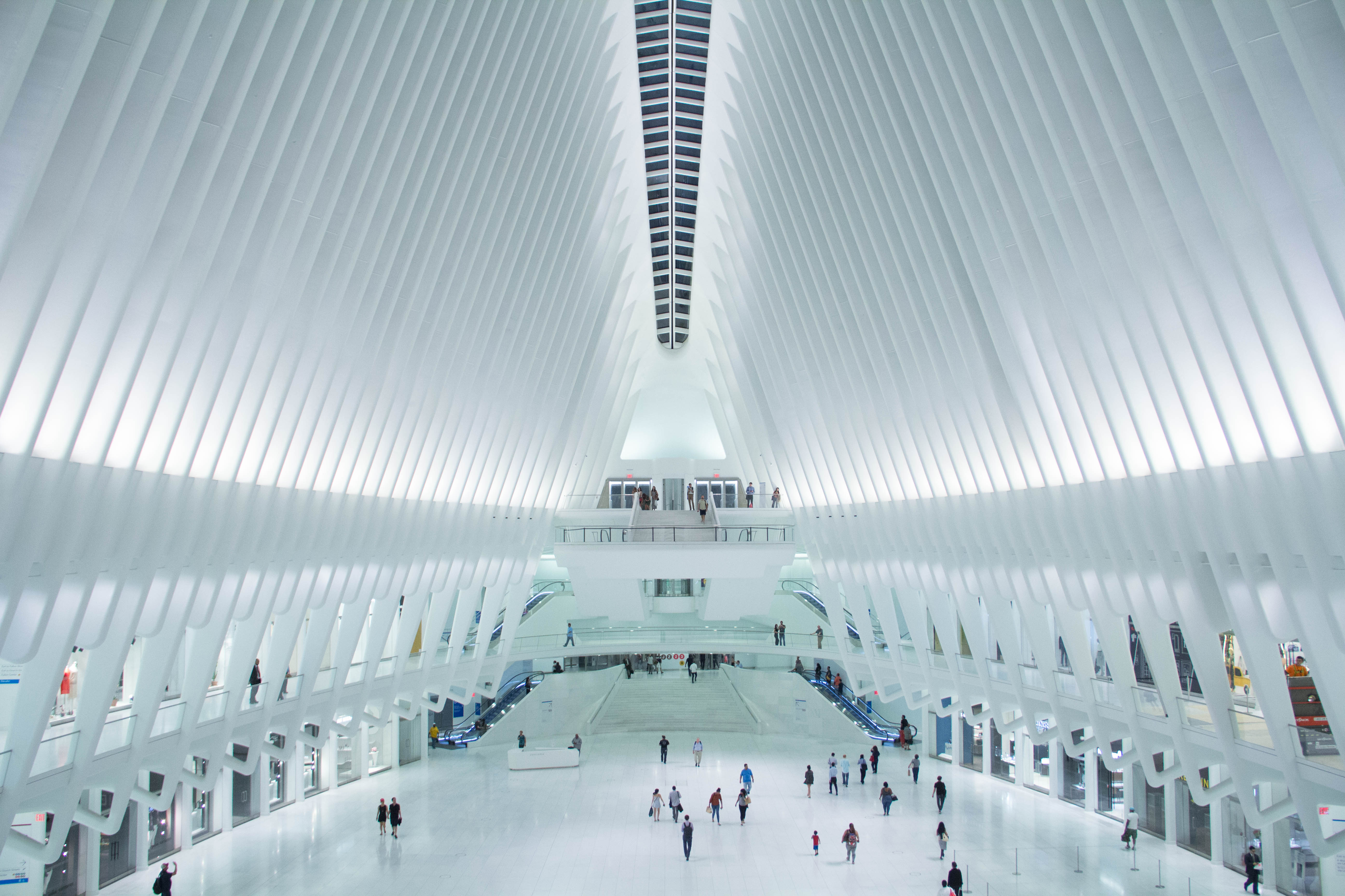 Interno del World Trade Center Transportation Hub